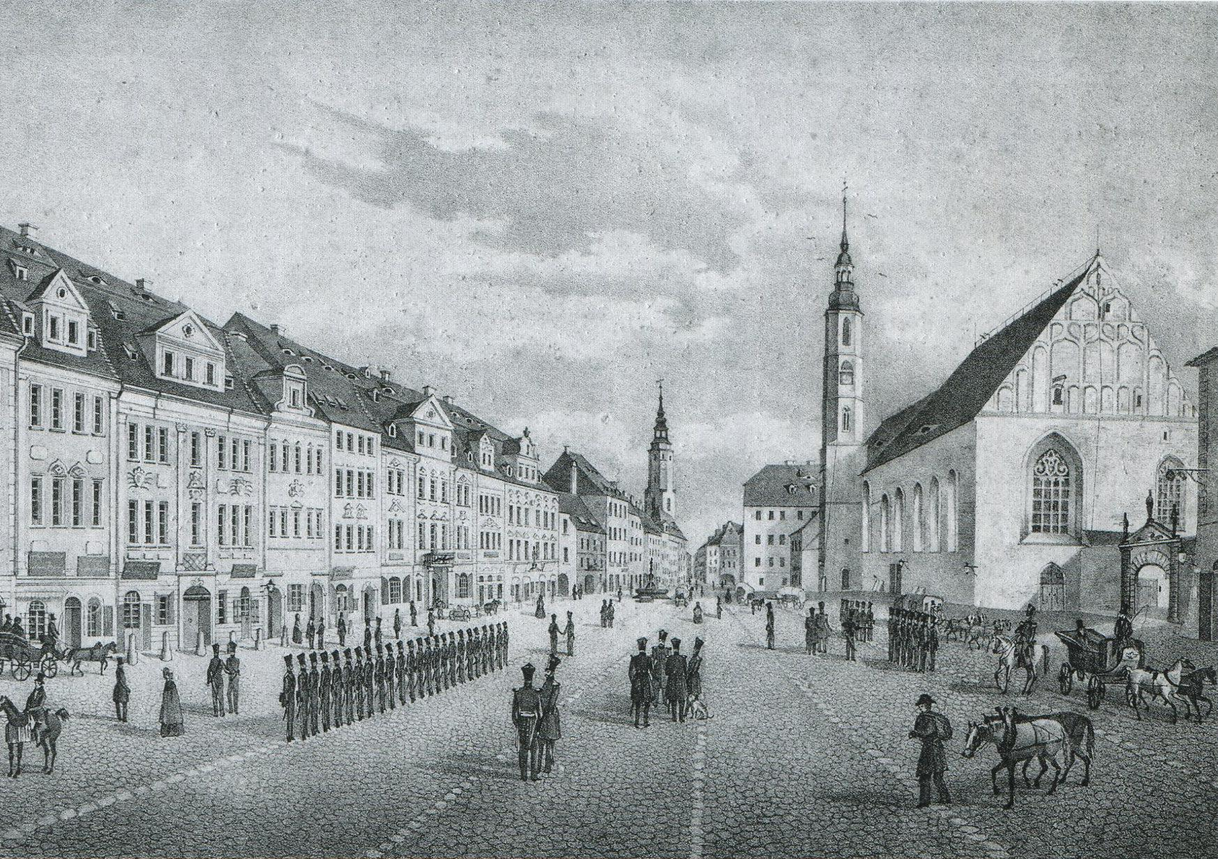 Zeichnung des Görlitzer Obermarktes 1841, er diente bis zur Fertigstellung der Jägerkaserne 1858 als Appellplatz der preuß. Garnisonstruppen (5. Jäger-Bataillon)